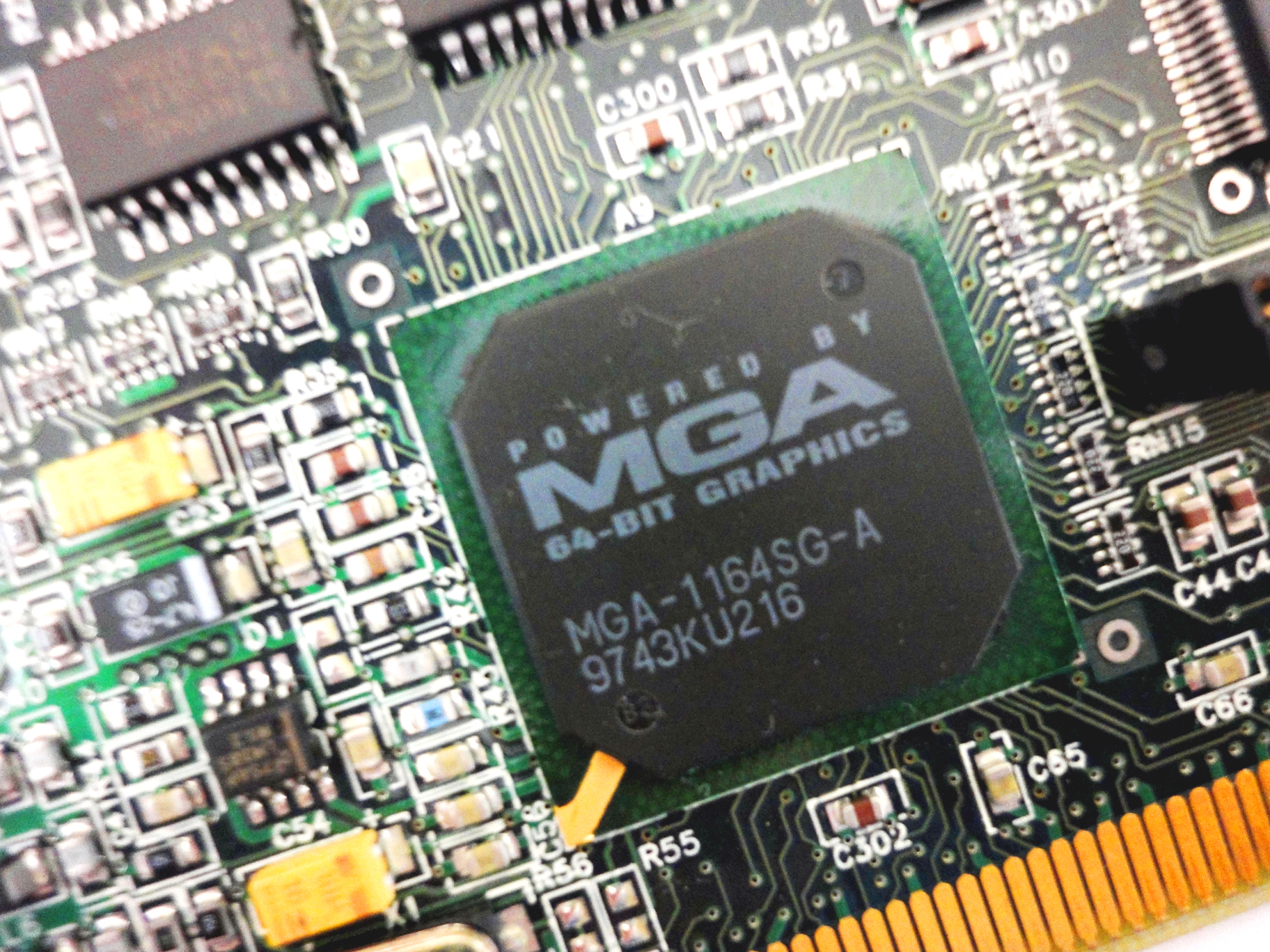 Matrox mga 1164SG